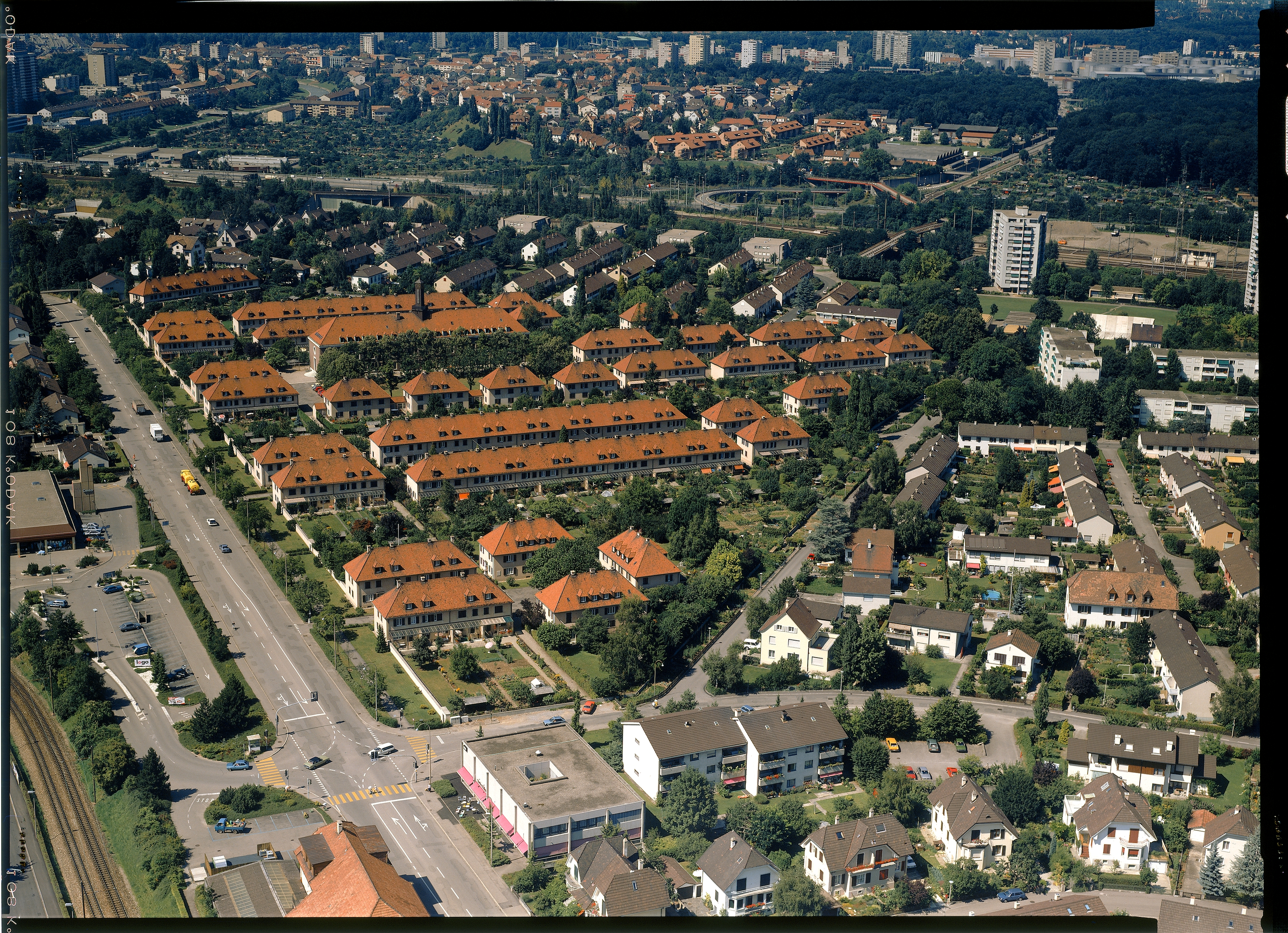 Genossenschaftssiedlung Freidorf, Muttenz BL, Schweiz, Juli 1988